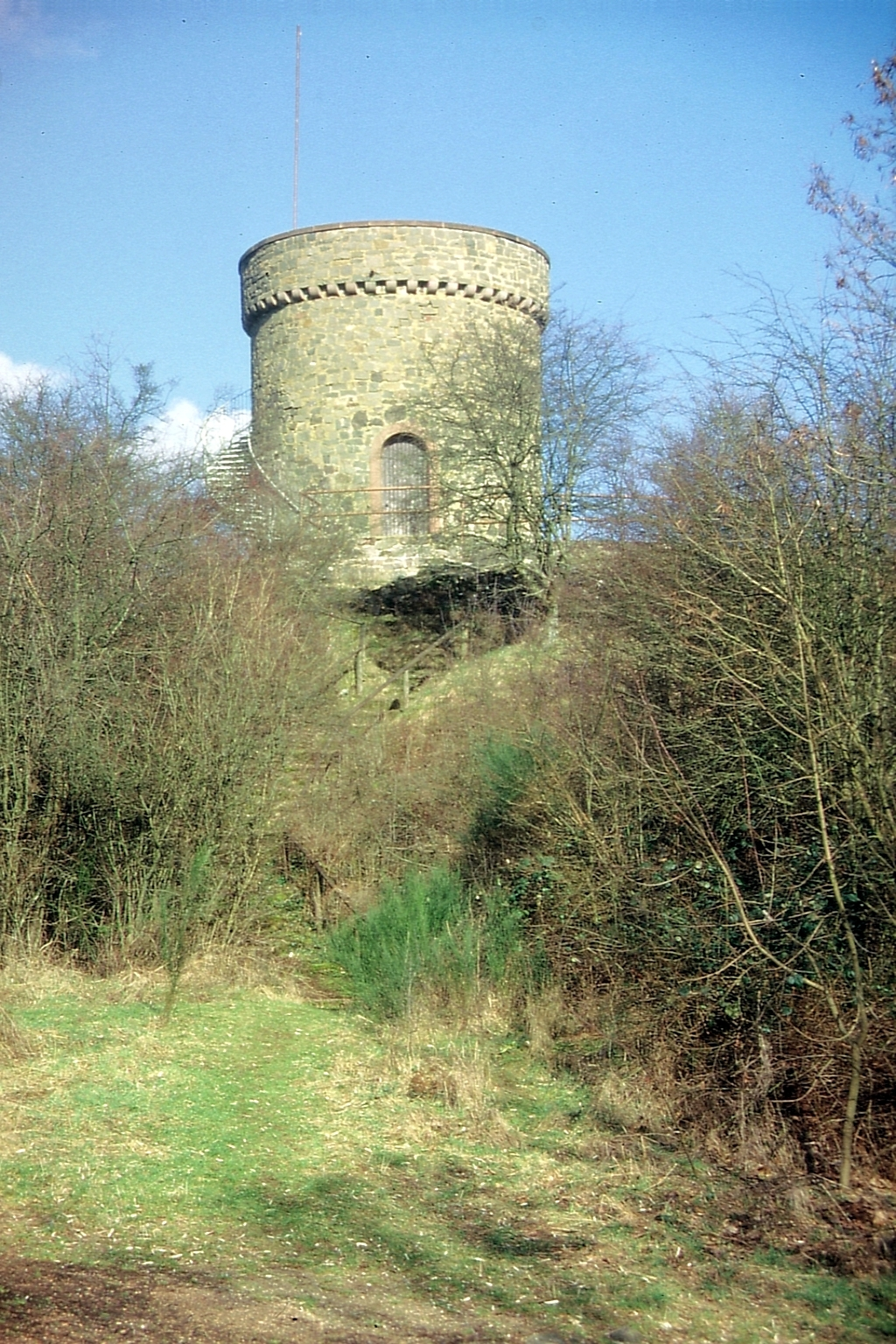 Liebenburg bei Hofeld